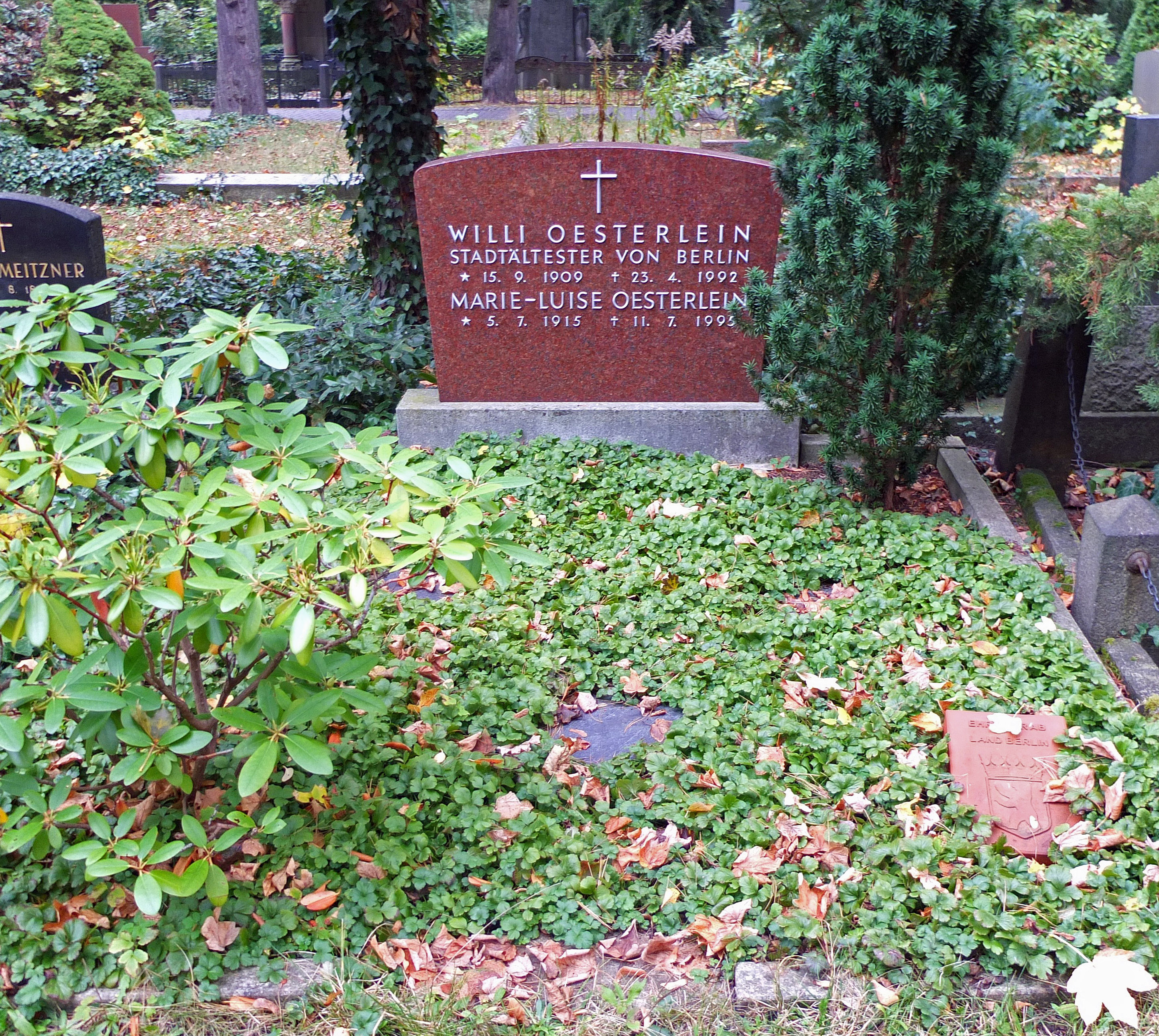 Grab von Willi Oesterlein auf dem Luisenfriedhof II in Berlin-Westend.